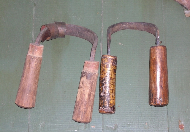 Työkalu, Kolomaraudat